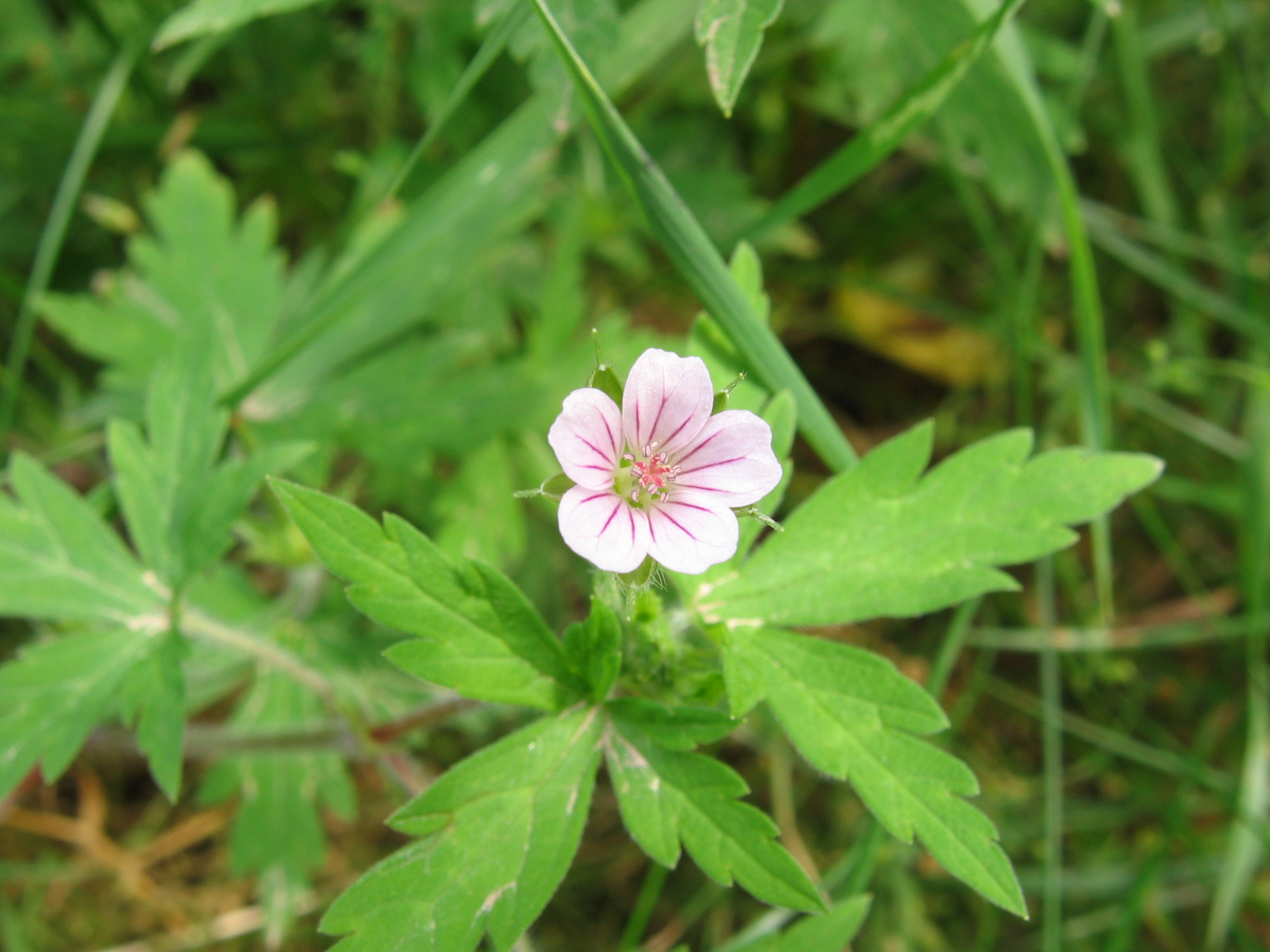 Sibirinis snaputis (Geranium sibiricum)